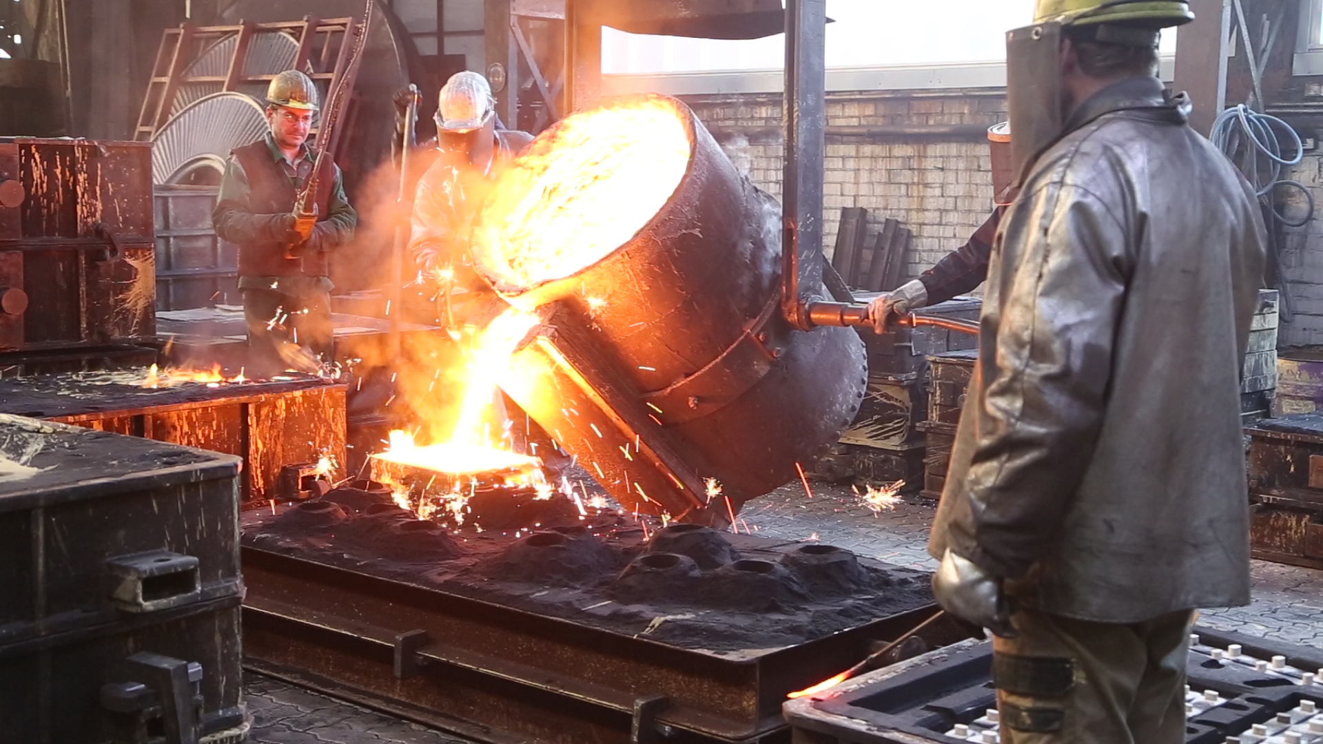 Das Denkmal wird in der Eisengießerei als Grauguss fertiggestellt.